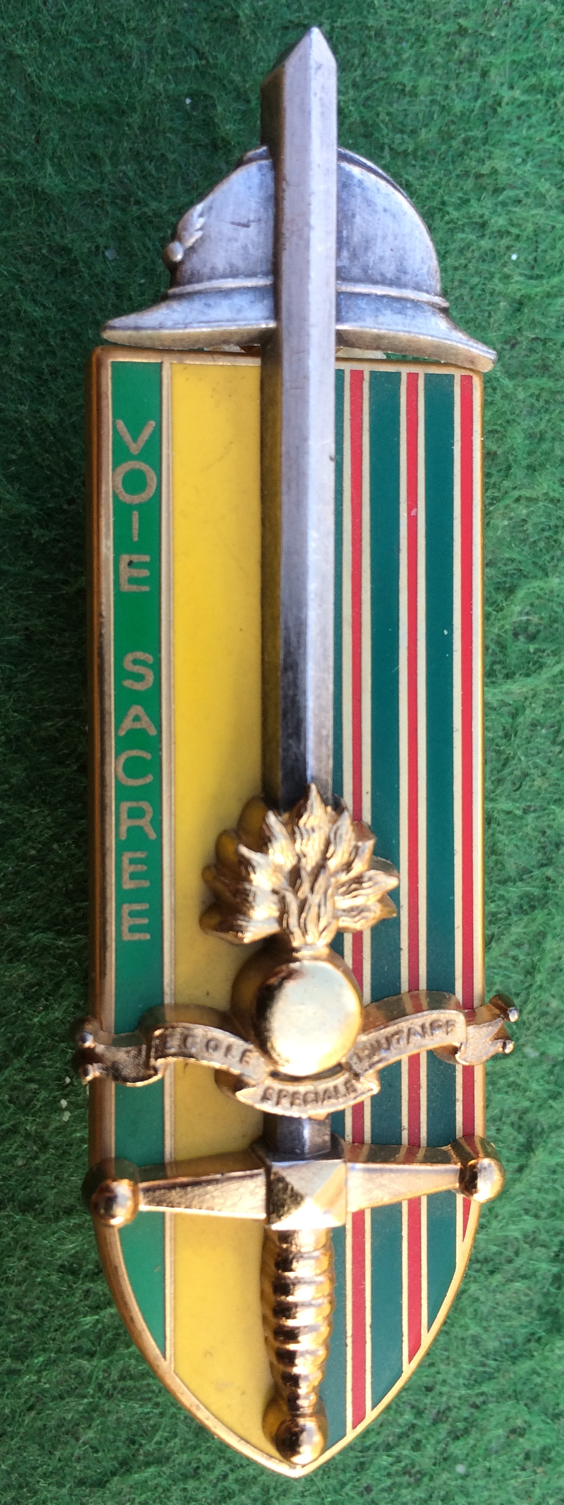 Insigne de la promotion du 4e bataillon de l'ESM Saint-Cyr Coëtquidan «Voie sacrée» (1998). Cet insigne est le second d'une série de cinq insignes standardisés (graphie identique, seul le nom de la promotion change) couvrant la période de l'existence de la filière «Voie de commandement» des élèves officiers de réserves (EOR). Elle est aux couleurs de la Médaille militaire (sur lesquelles est inscrit le nom de la promotion) et de la Croix de Guerre, comporte l'insigne de l'ESM Saint-Cyr, en commémoration de leur sacrifice lors de la Grande guerre (1914-1918). L'épée symbolise le statut des officiers (Arthus-Bertrand Paris)